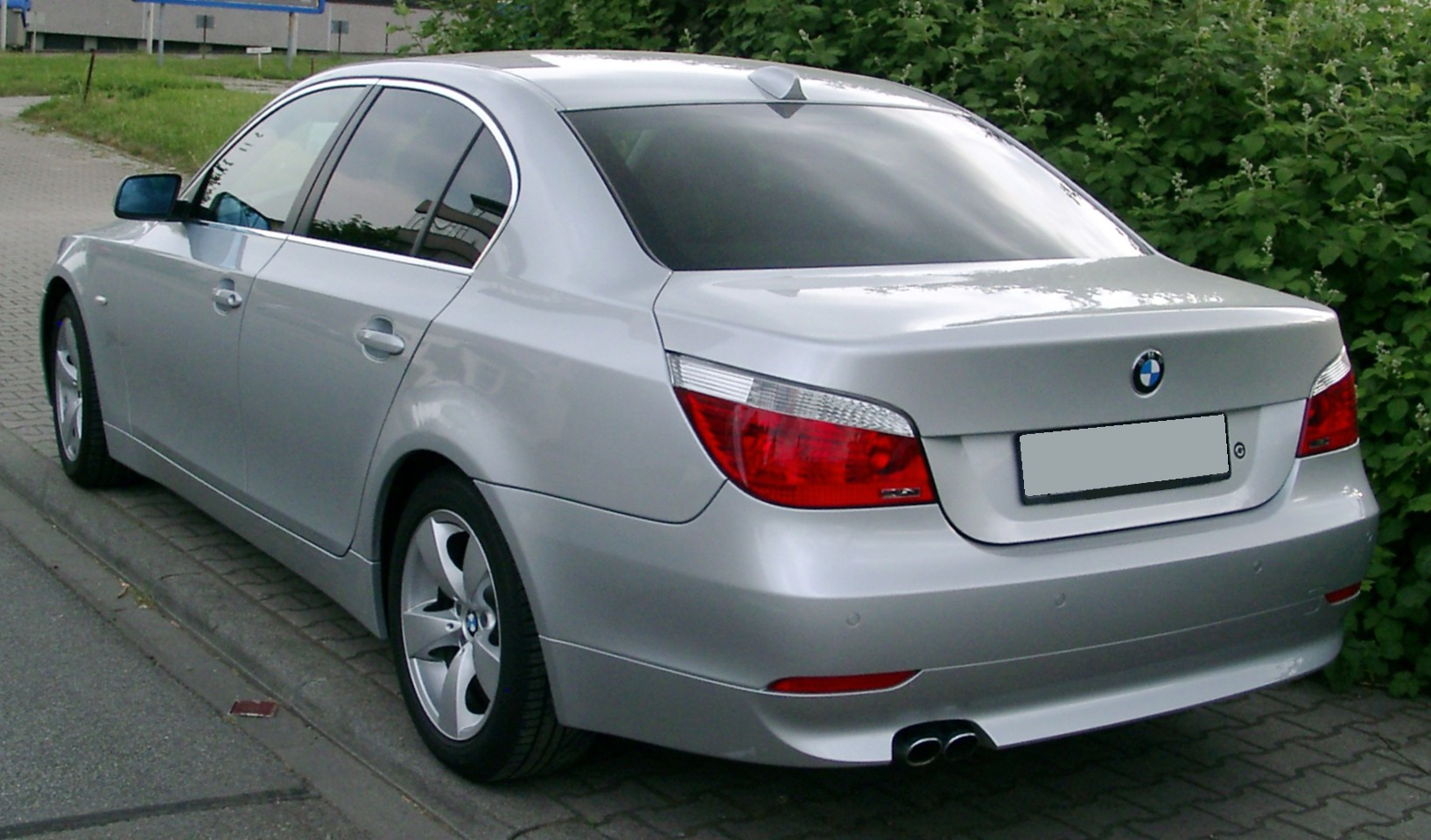 BMW E60